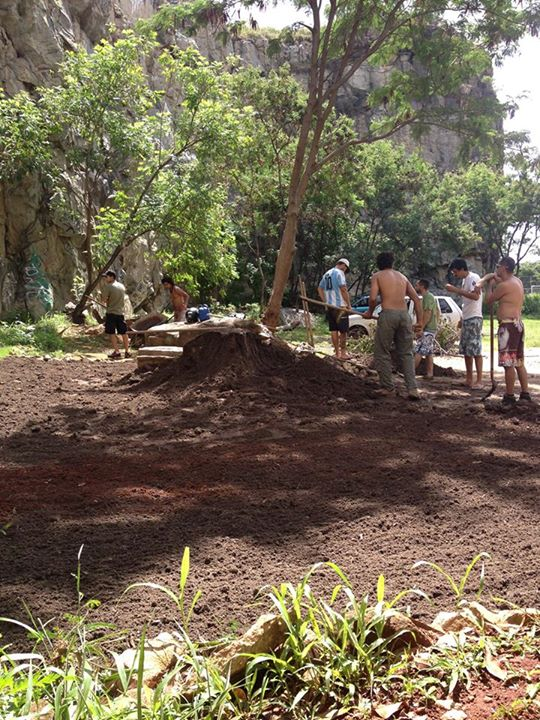 Mutirão de trabalho realizando manutenção no Espaço Recanto Azul